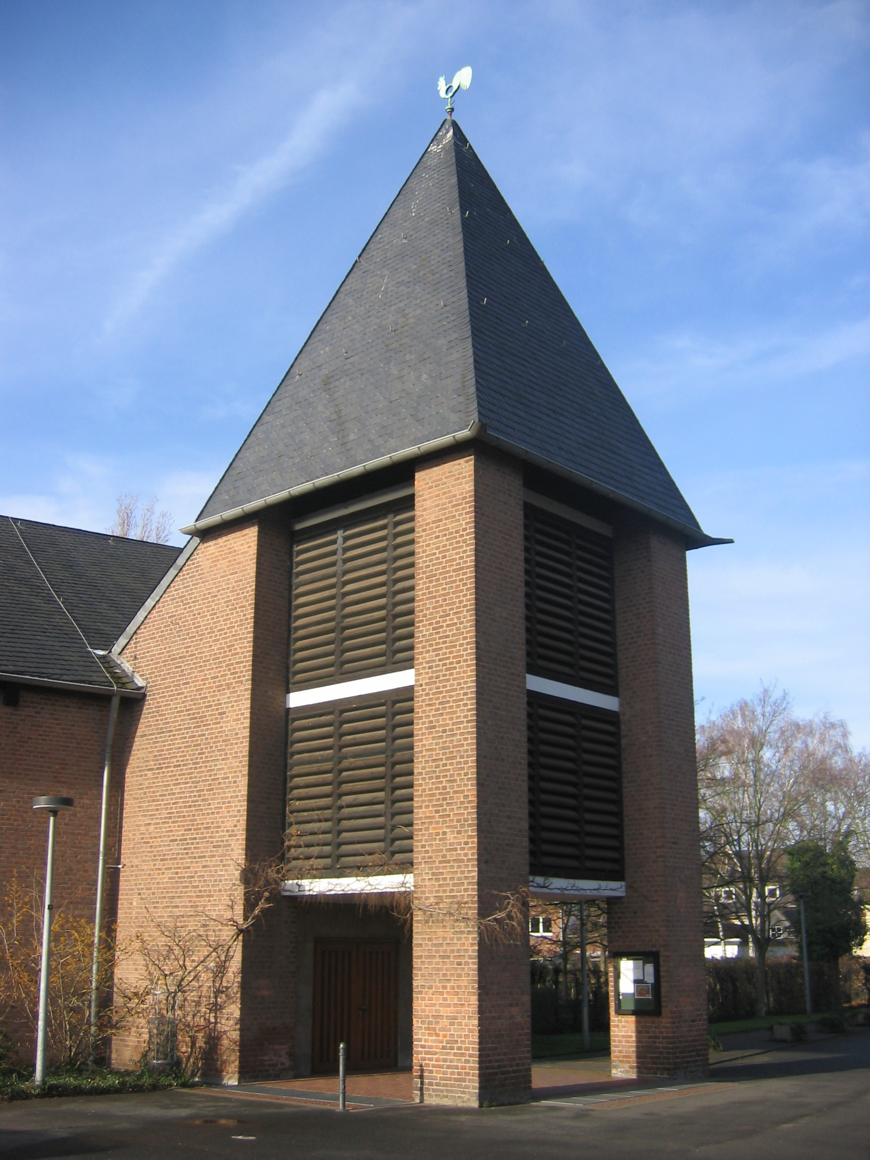 Glockenturm von St. Georg in Köln-Weiß.